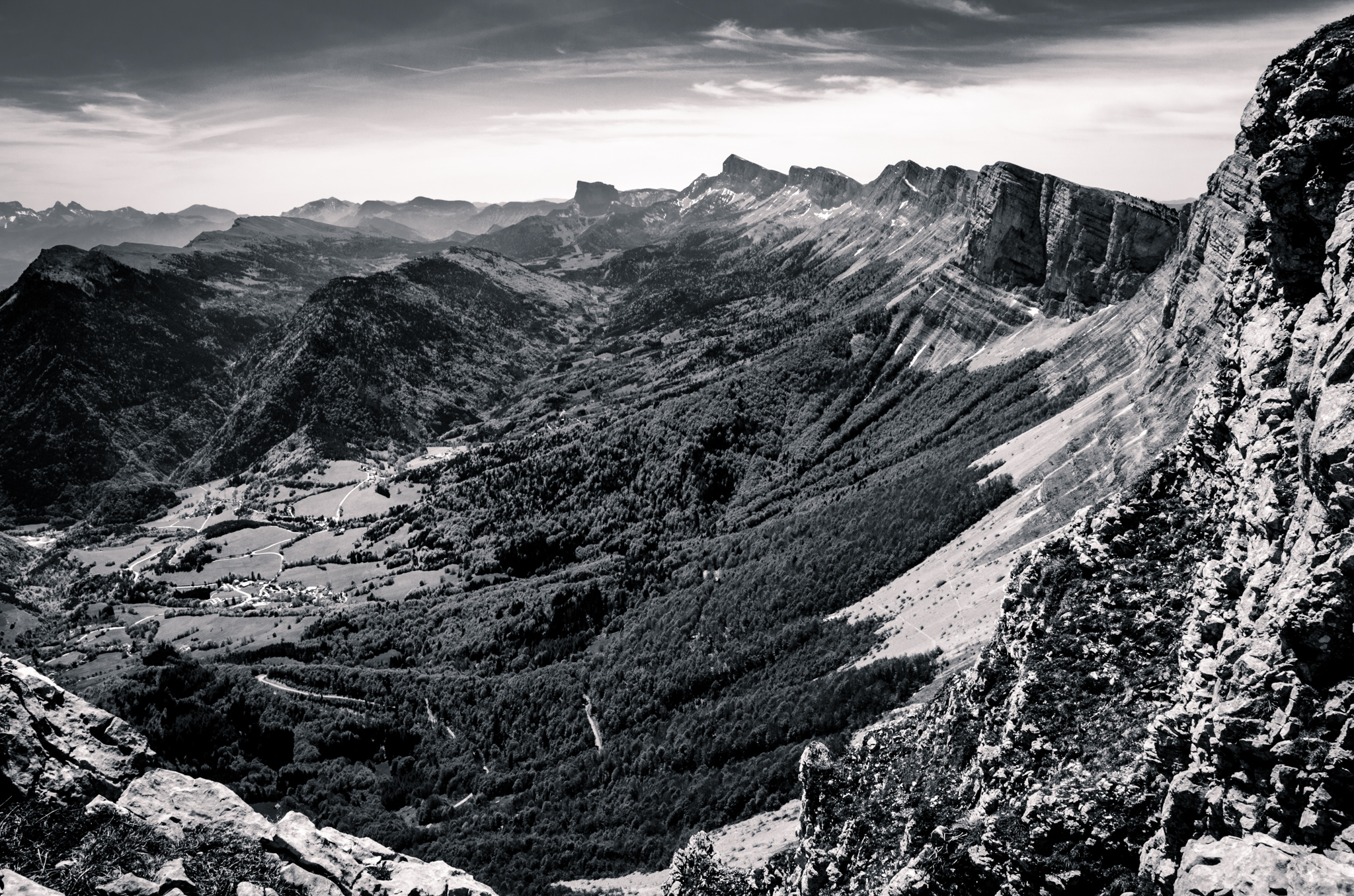 Tête des Chaudières, Château-Bernard (38).